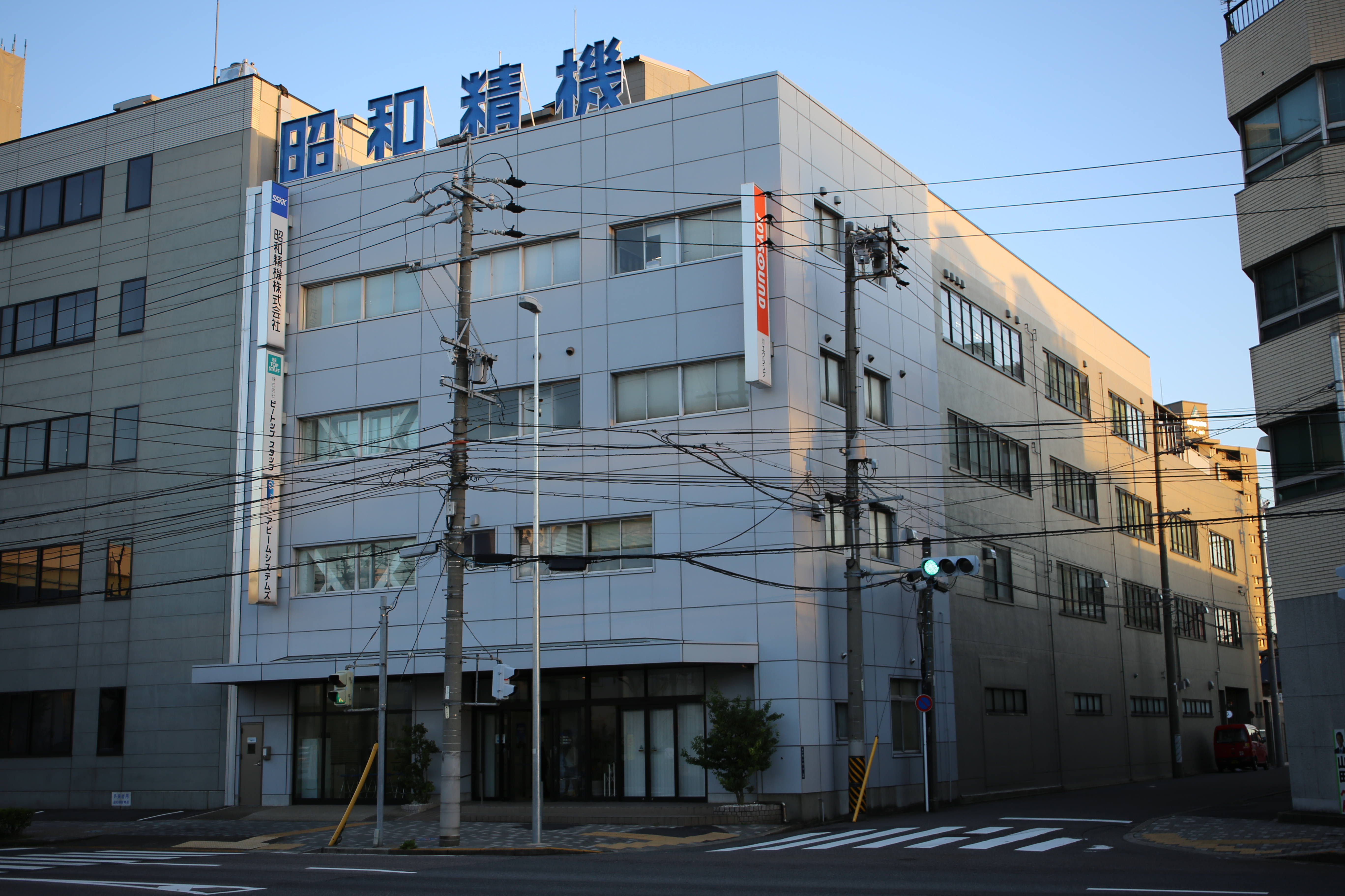 名古屋市瑞穂区塩入町の昭和精機本社を北側公道西側より撮影